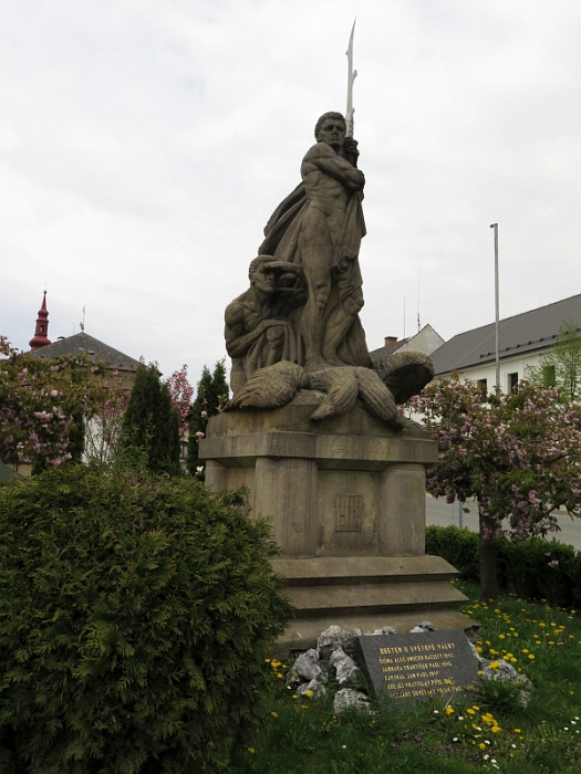 Pomník padlých Na stráž, náves, Třeština.